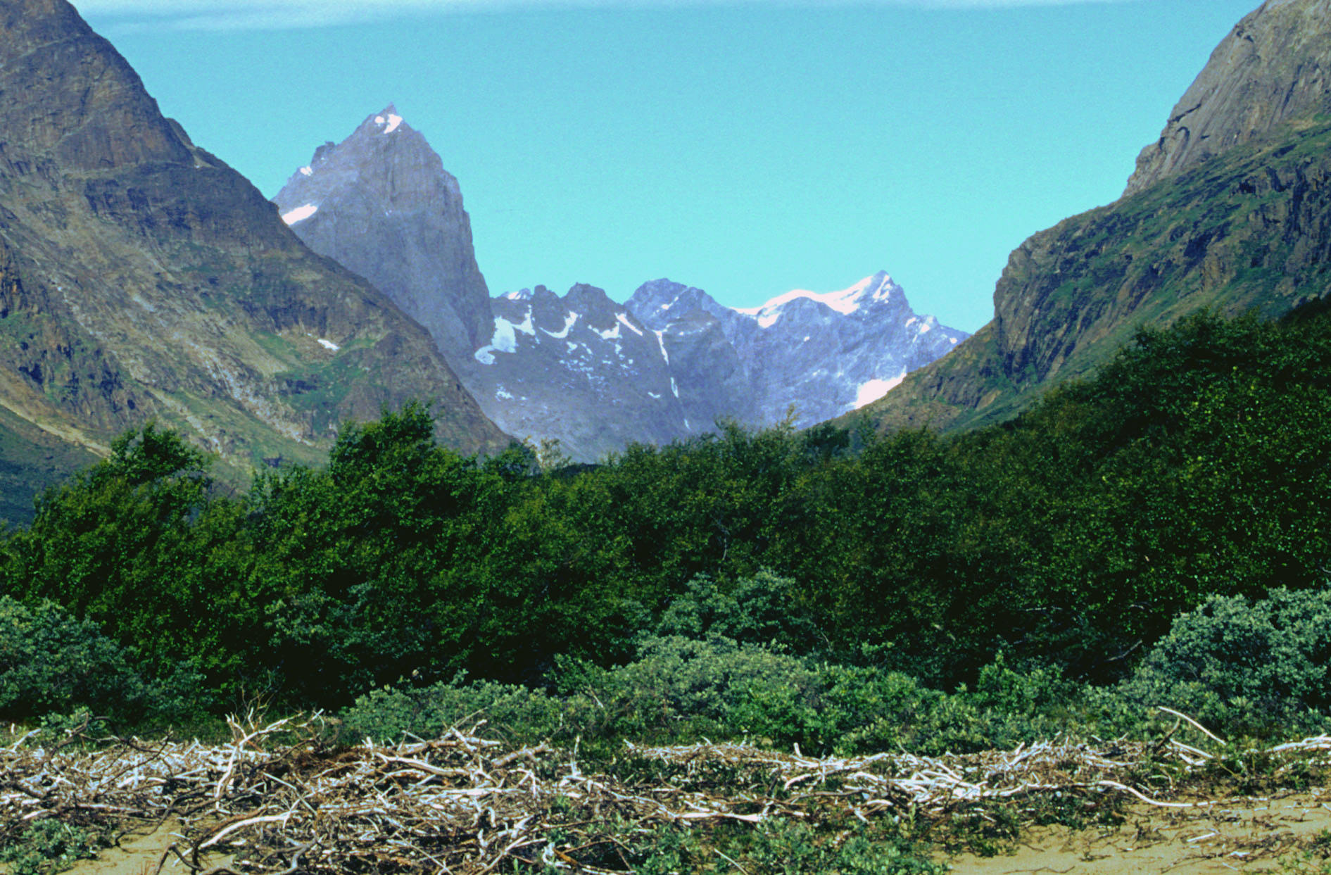 quinnguadalen